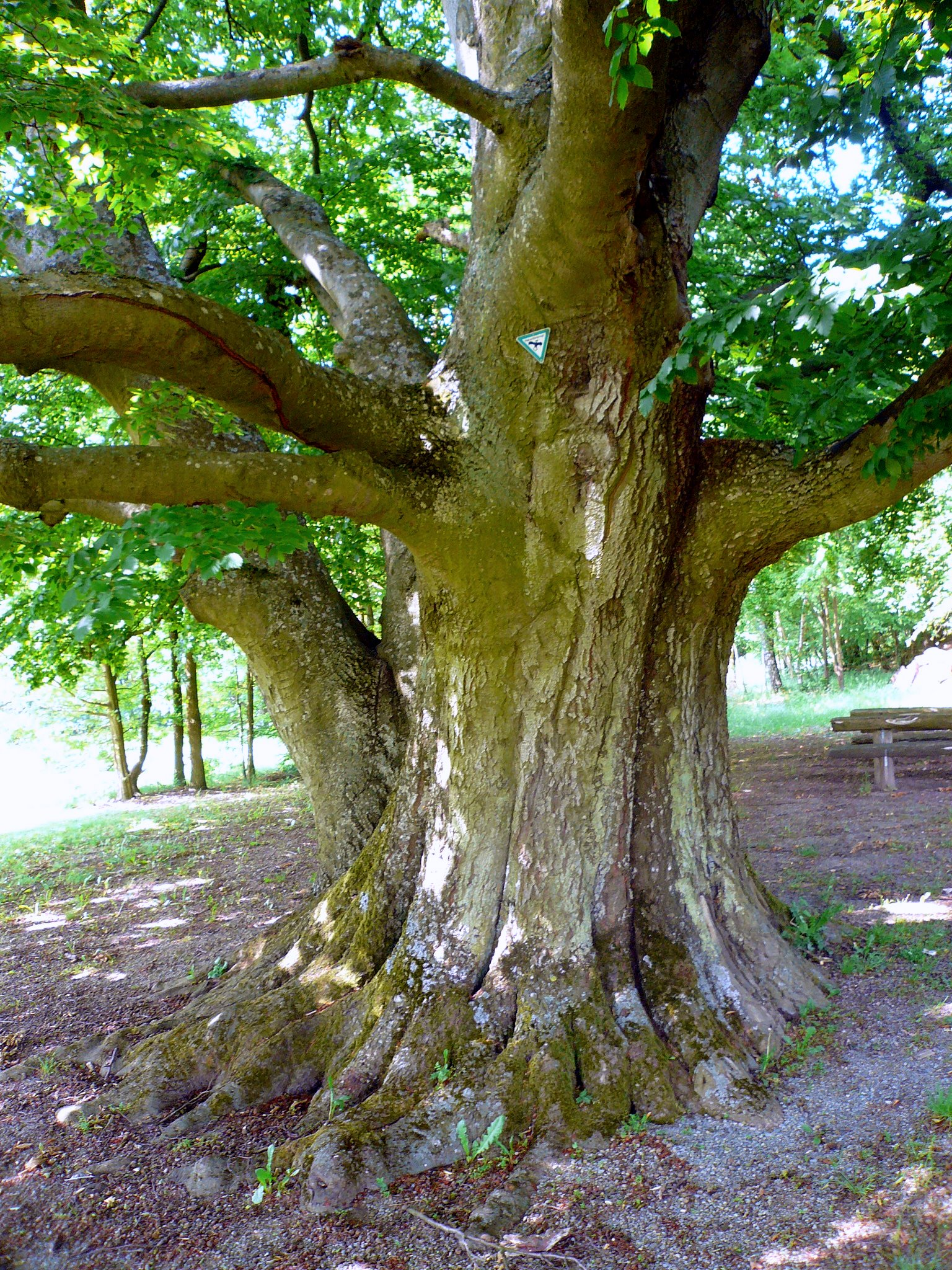 Hutbuche bei Frauenroth